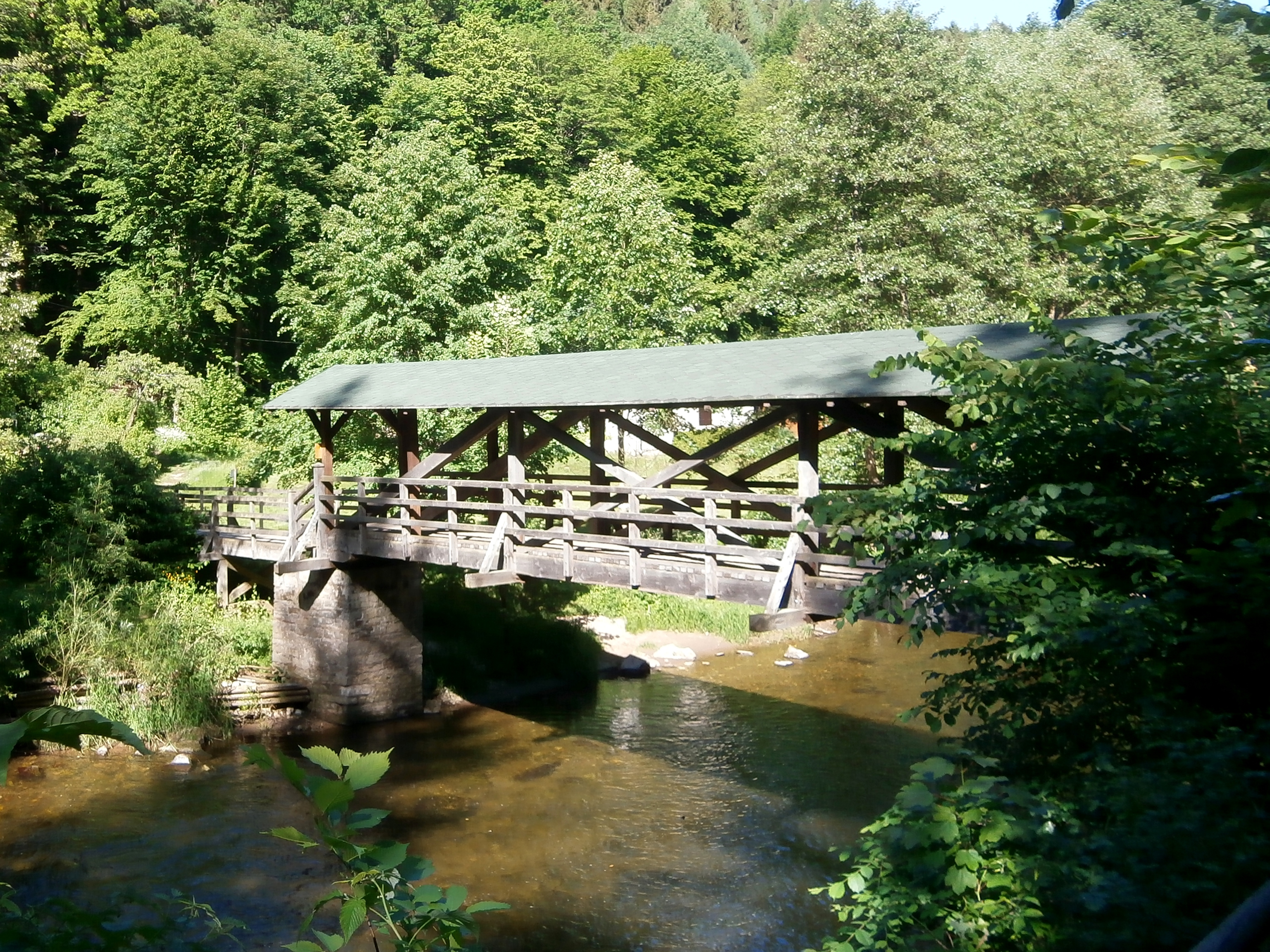 Boušínská lávka přes Úpu